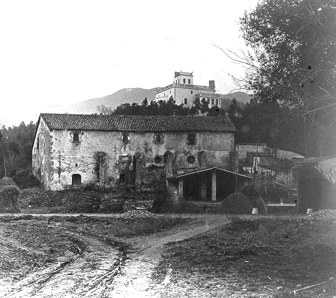 Can Fontanet a Montcada i Reixac. Josep Salvany i Blanch (1915)